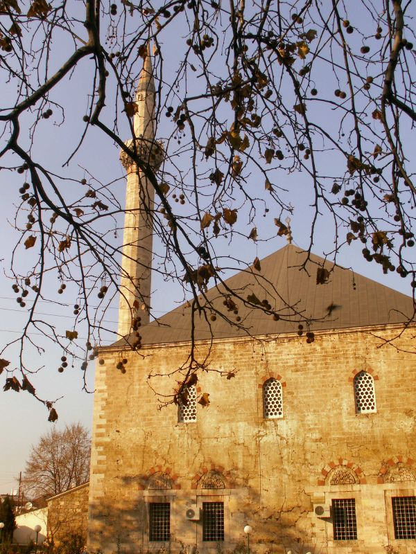 Bit Pazar Mosque 02